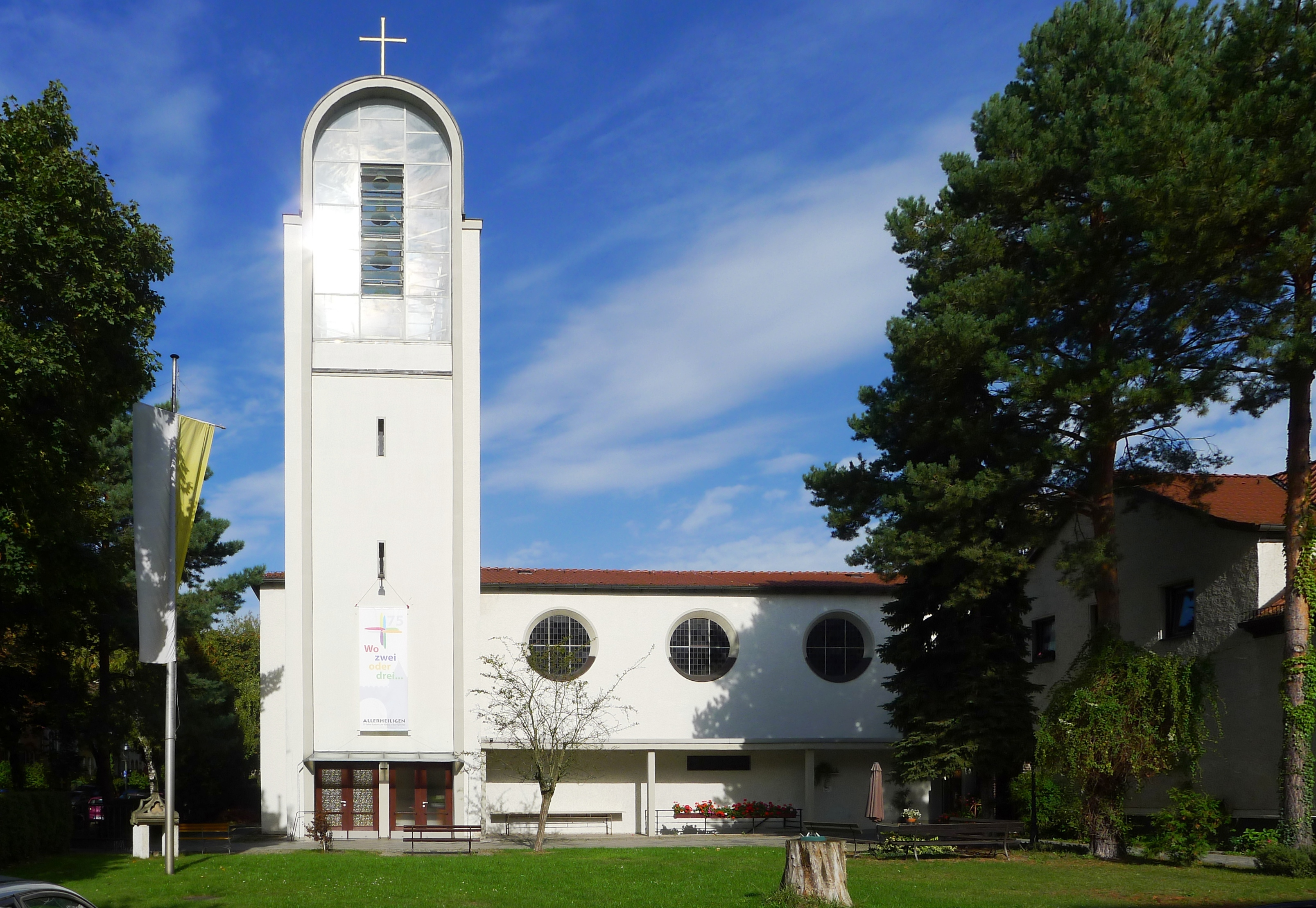 denkmalgeschützte Kirche Allerheiligen in Berlin-Borsigwalde